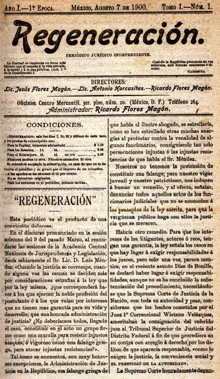 Portada del primer ejemplar del periódico Regeneración, fundado por los Hermanos Flores Magón el 7 de agosto de 1900.